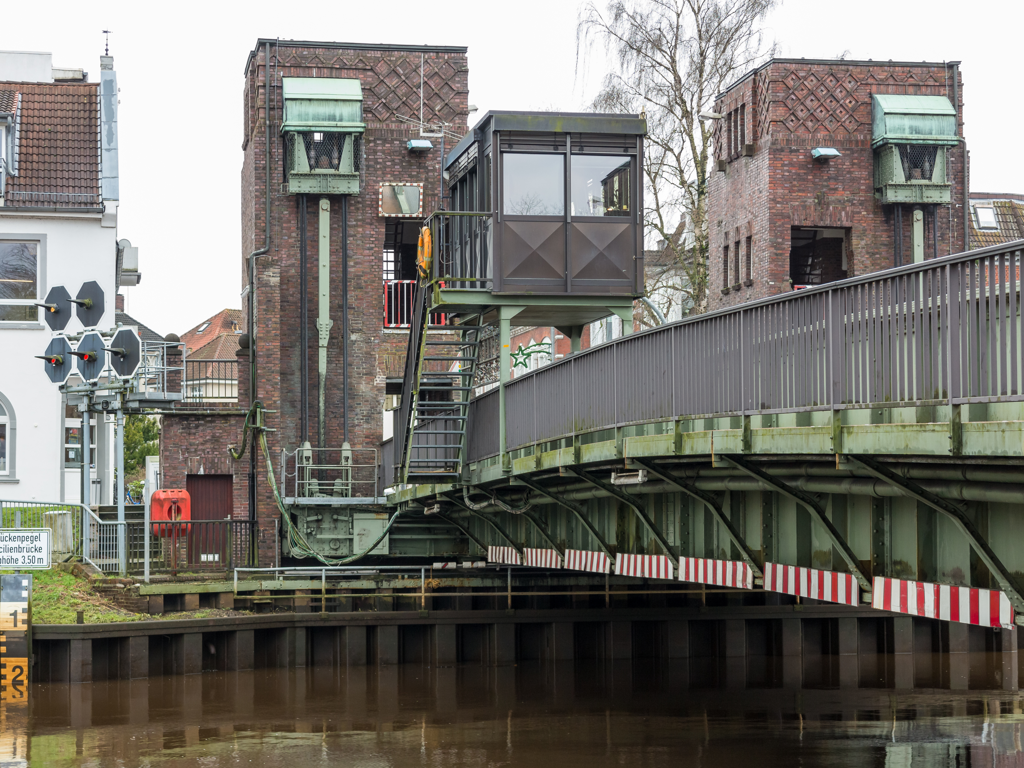 Oldenburg (Oldb): Cäcilienbrücke mit Wärterhaus und den Türmen auf der Osternburger Seite im Dezember 2014. Die 1927 erbaute Brücke wird in 2020 abgebrochen.